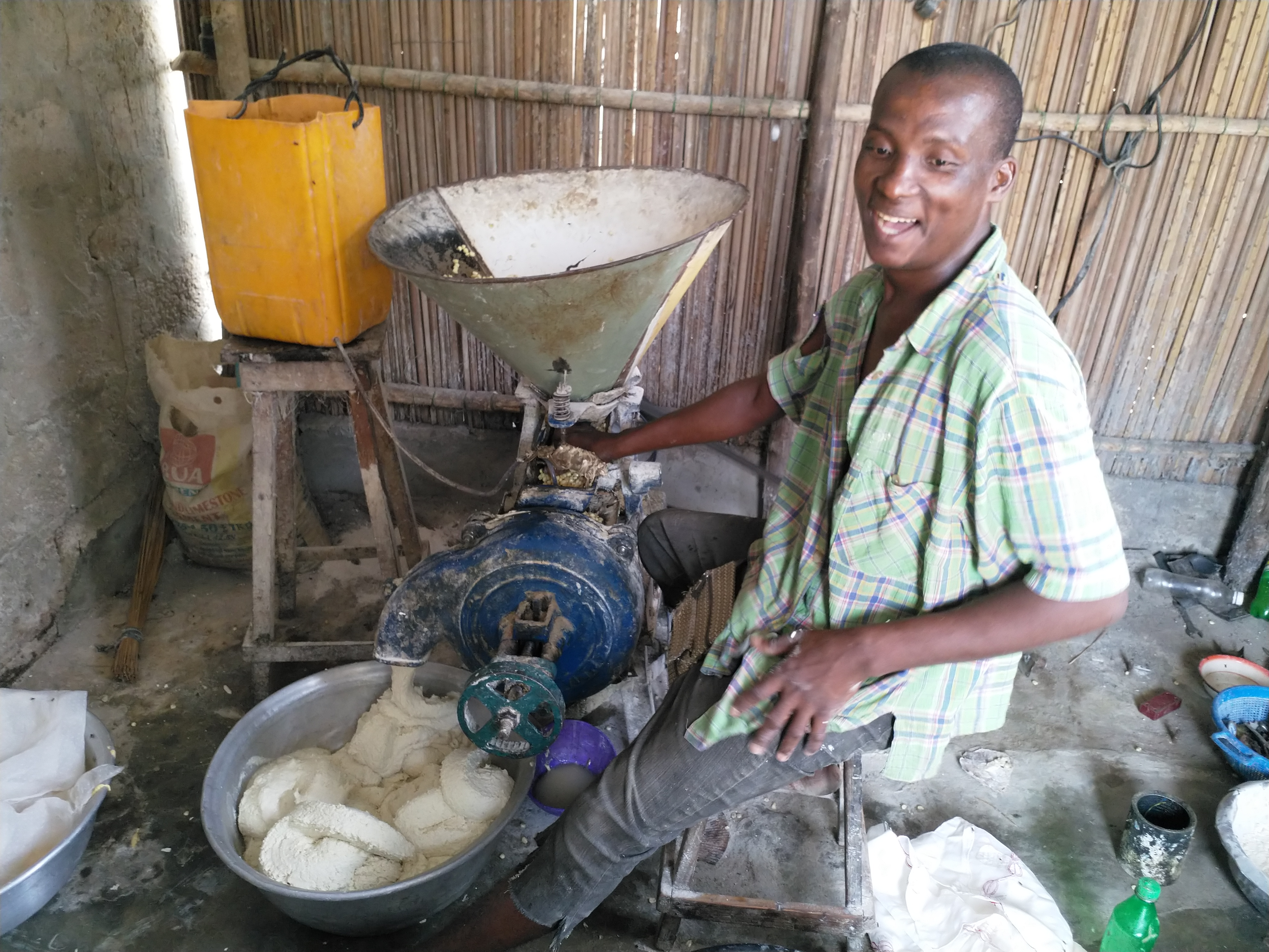 Le meunier à Djeffa. Il transforme les grains de maïs apportés par les habitants en farine de maïs. La farine de maïs est l'un des composants essentiels de l'alimentation au Bénin This is an image of "African people at work" from Benin